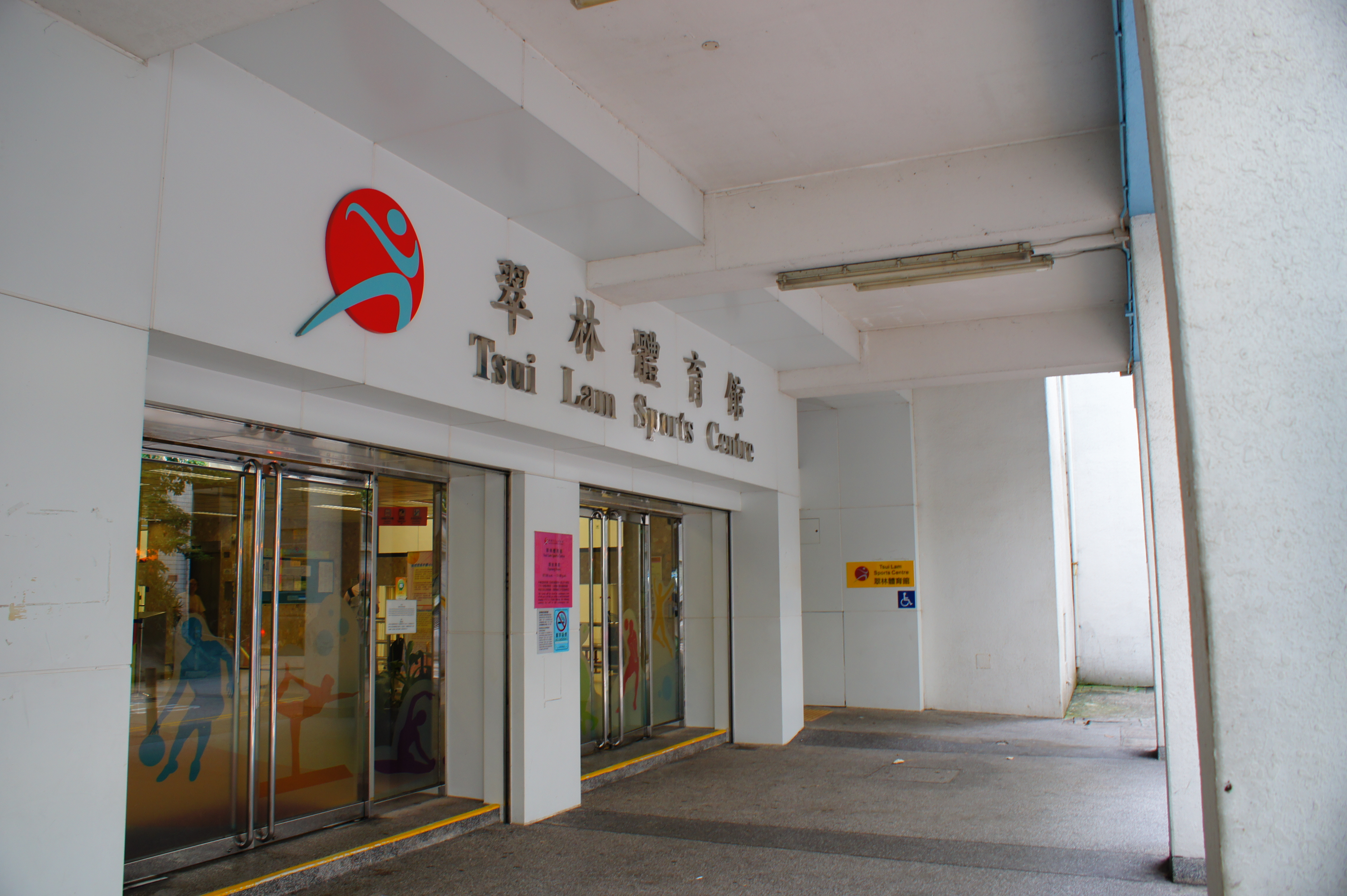 中文（香港）: Tsui Lam Sport Centre 翠林體育館